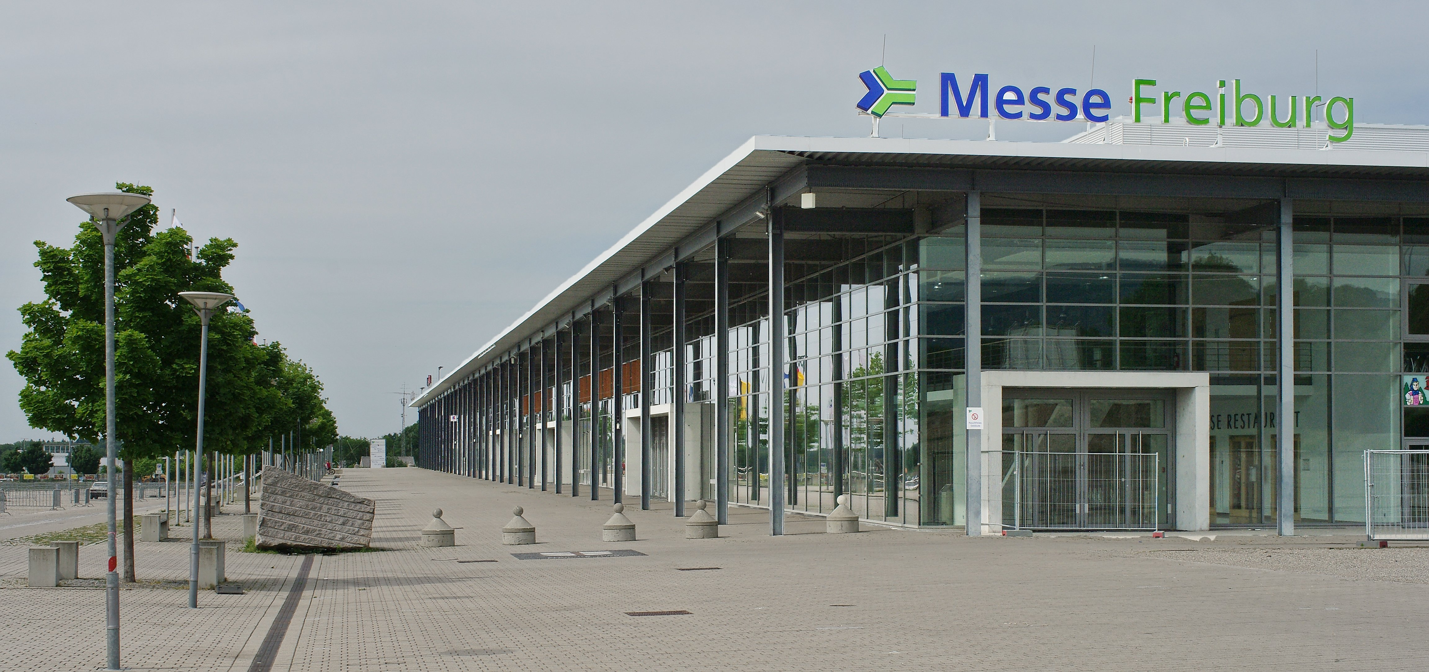 Das Gebäude der neuen Messe in Freiburg